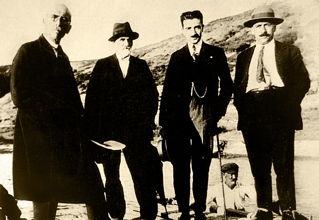 Dr. Rifat Osman, Eski Edirne Belediye Başkanı, Trakya Paşaeli Müdafai Hukuk Cemiyeti kurucusu ve başkanı Şevket Dağdeviren (dedem) ve Ord. Prof. Dr. Süheyl Ünver.